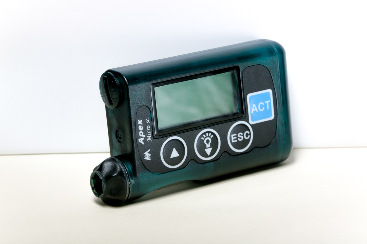 Pompa do ciągłego podawania treprostinilu podskórnie.